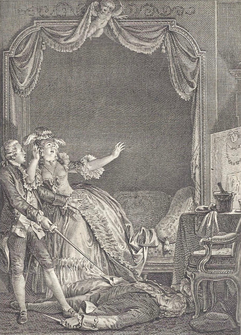 Philippe Trière (1756–1815) nach Jean-Michel Moreau (1741–1814): Illustration zu Kapitel 9 von "Candide" in der von Pierre-Augustin Caron de Beaumarchais (1732–1799) veranstalteten 70-bändigen Ausgabe der Werke von Voltaire (1694–1778), Kehl 1787.